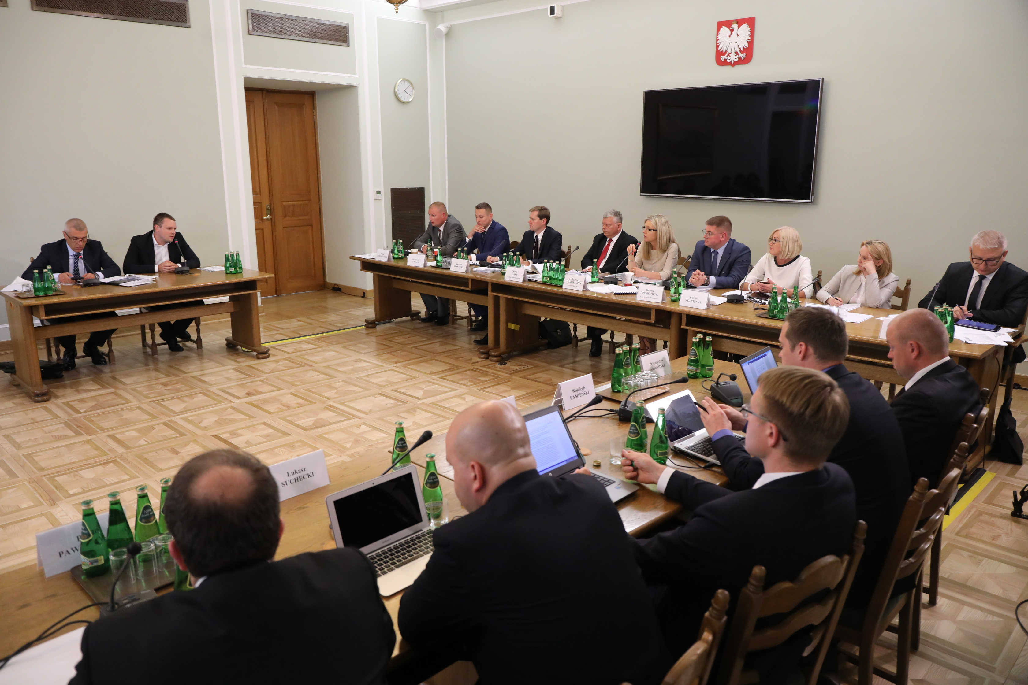 Sejmowa komisja śledcza ds. „Amber Gold”, przesłuchanie Michała Tuska.